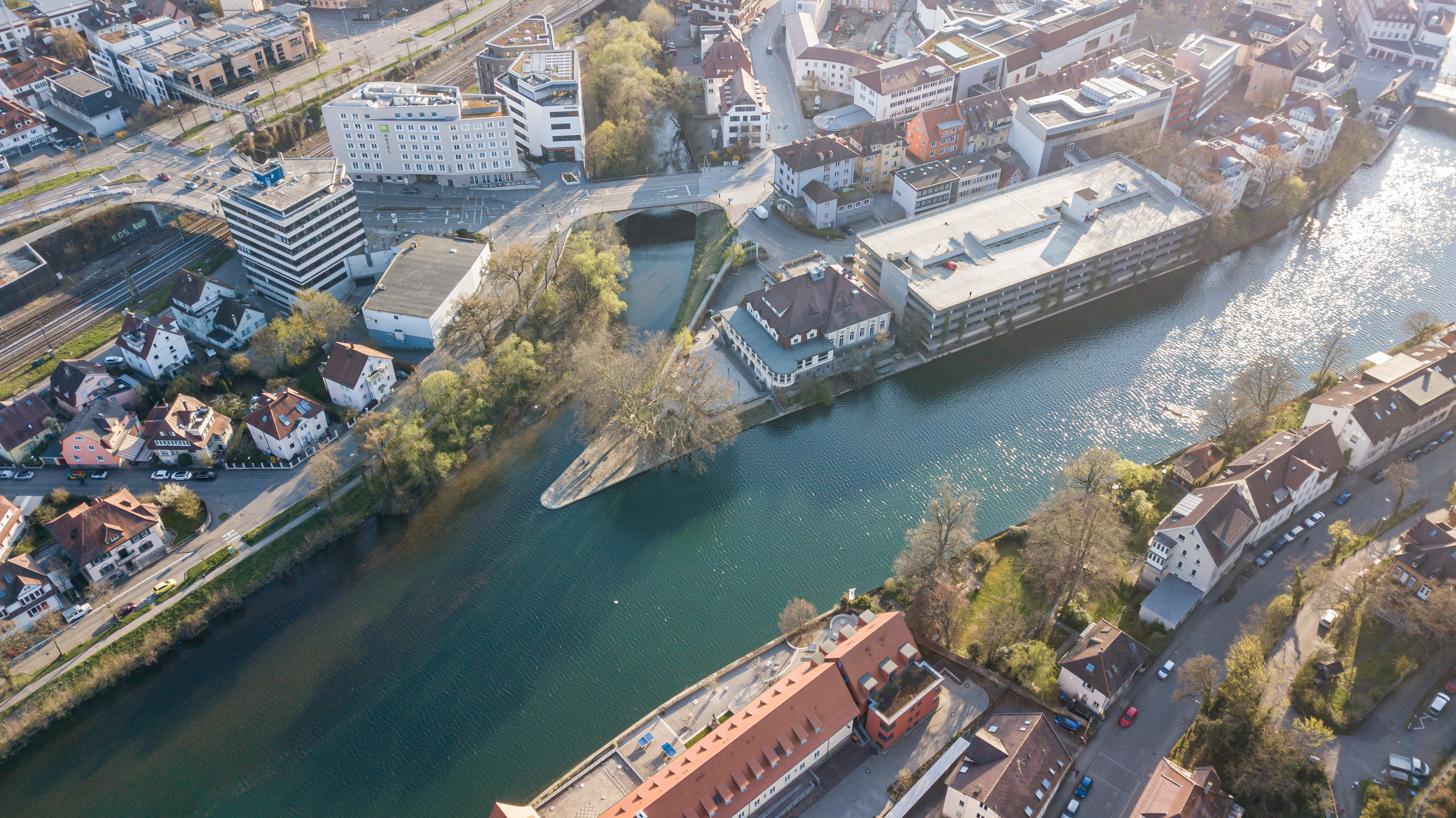 Neckarspitze in Tübingen aus der Luft vom Österberg gesehen